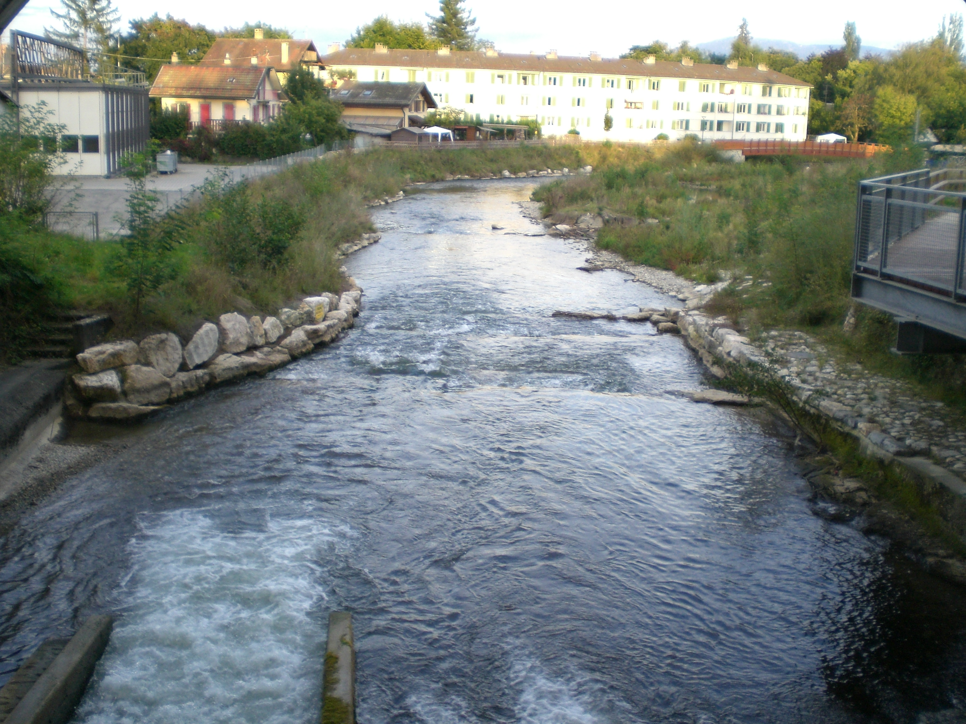 La Versoix à l'entrée de Versoix